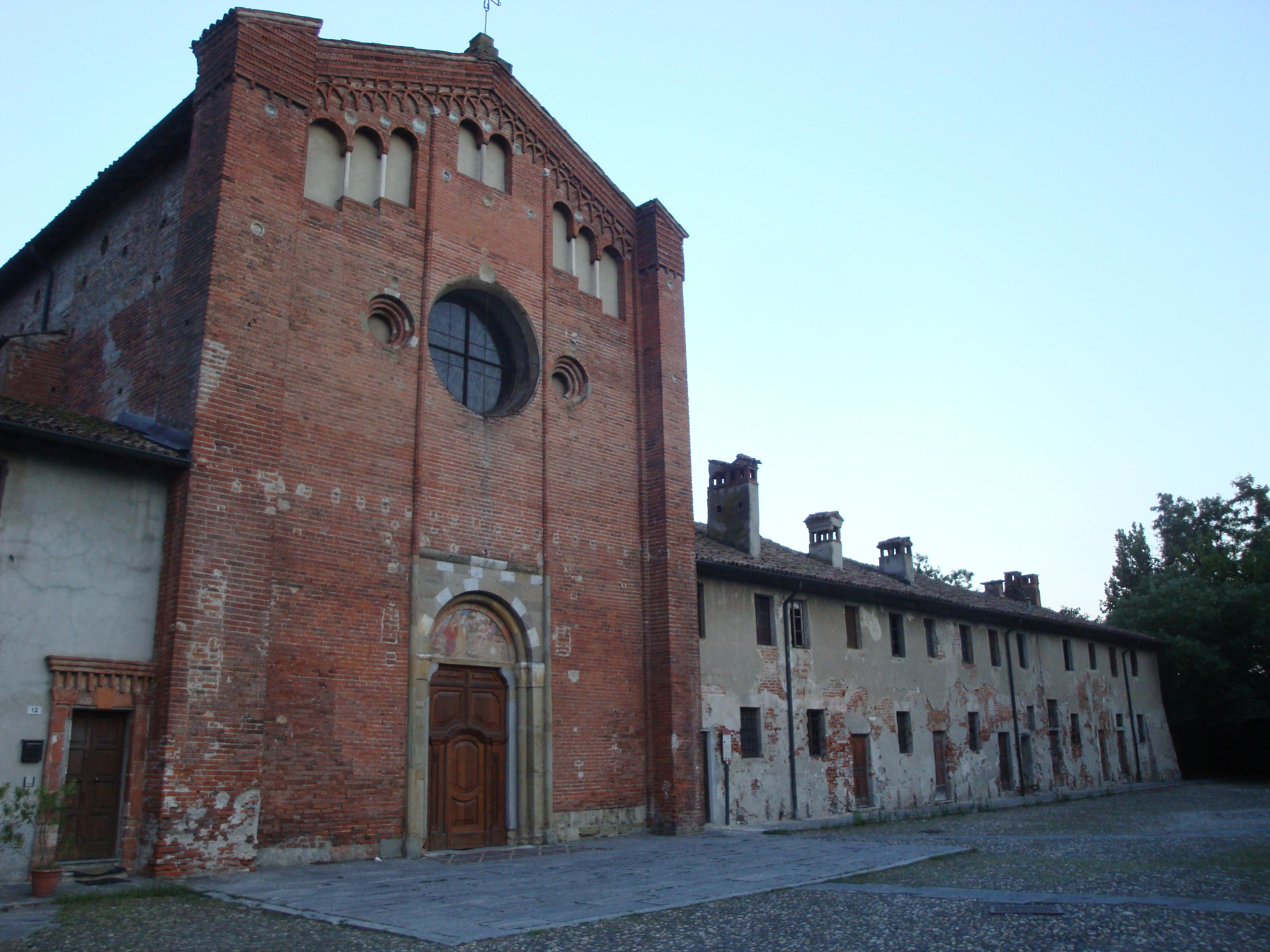 Chiesa di San Lanfranco (1257), Pavia